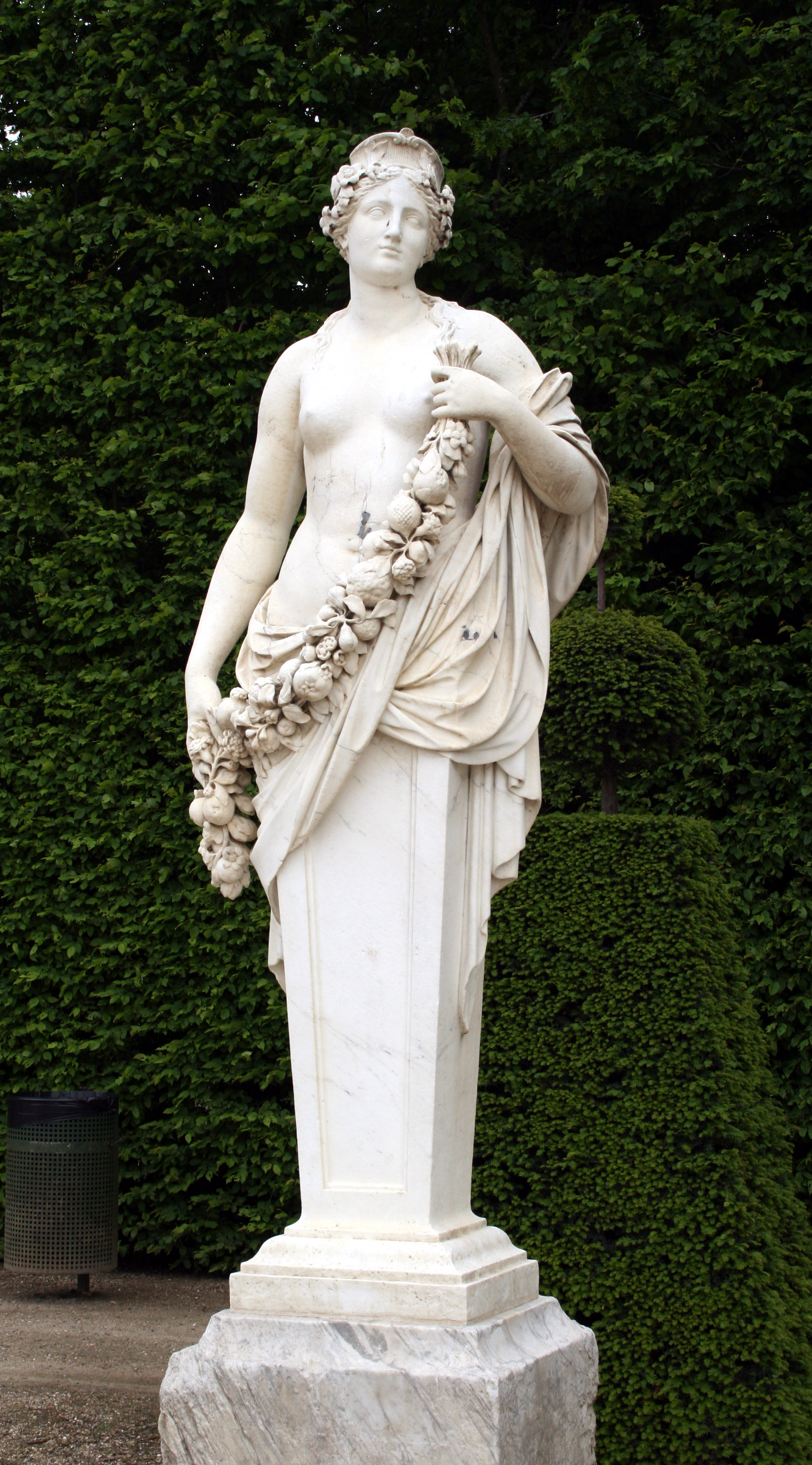 Pomone dans la demi-lune du Bassin d'Apollon du Park de Versailles